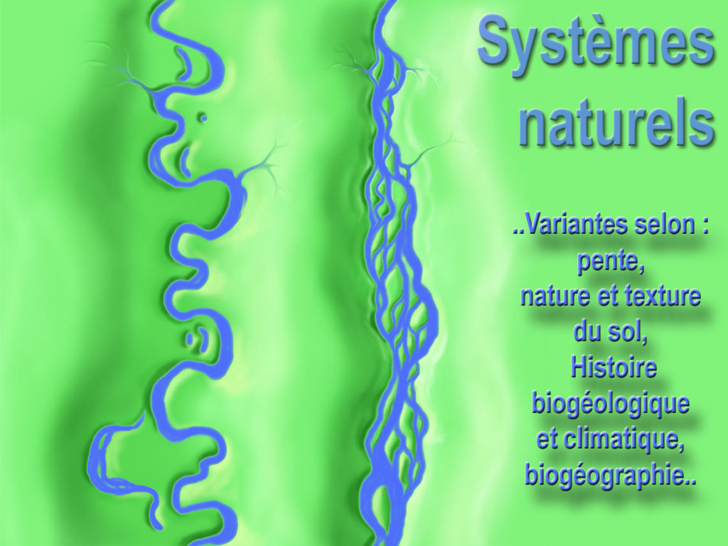 Les fleuves, quand ils ne s'enfoncent pas dans les canyons produisent des méandres, des bras-morts et un réseau complexes de cours d'eau dont le traçé change selon les saisons, et l'apport de sédiments (le chevelu). Cette structuration écopaysagère typique des fleuves de plaine tend à régresser ou disparaître au profit de la canalisation des fleuves, depuis plus de 500 ans en Europe, avec diverses conséquences négatives : accélération des flux d'eau, impliquant ; inondations plus graves et plus fréquentes en aval sécheresses accrues en amont. aggravation de l'érosion, localement perturbations écologique, avec fragmentation écopaysagère et dégradation de l'eau liée à l'artificialisation des berges, et souvent aux écluses et barrages associés à ces aménagements moindre alimentation de la nappe phréatique, car la surface et souvent le volume total d'eau du cours des fleuves diminuent, alors que toutes choses égales par ailleurs, c'est la hauteur d'eau qui contrôle la vitesse de percolation (Loi de Darcy).